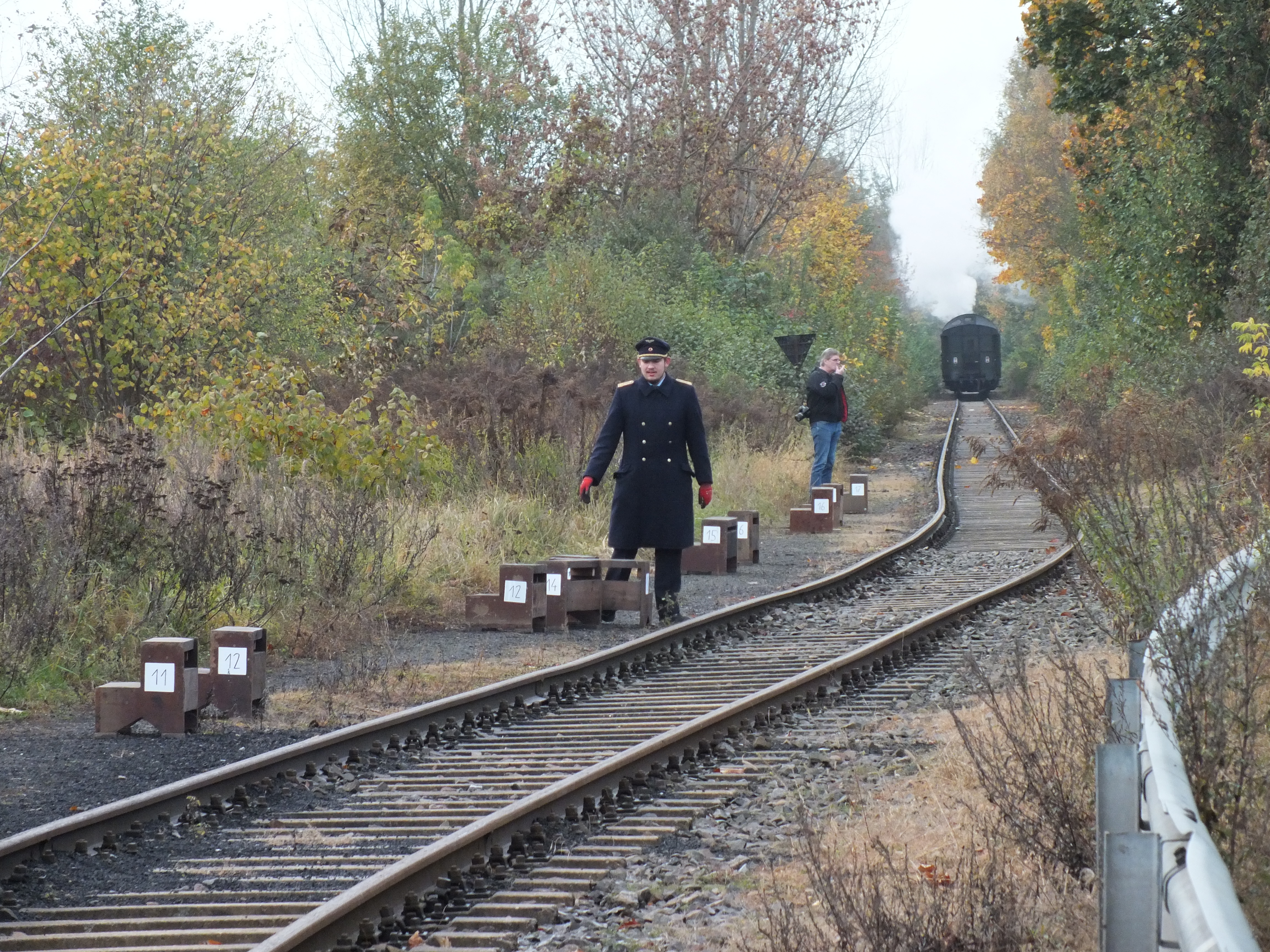 Heidekrautbahn, Museumsfahrt: Haltepunkt Wilhelmsruher Damm